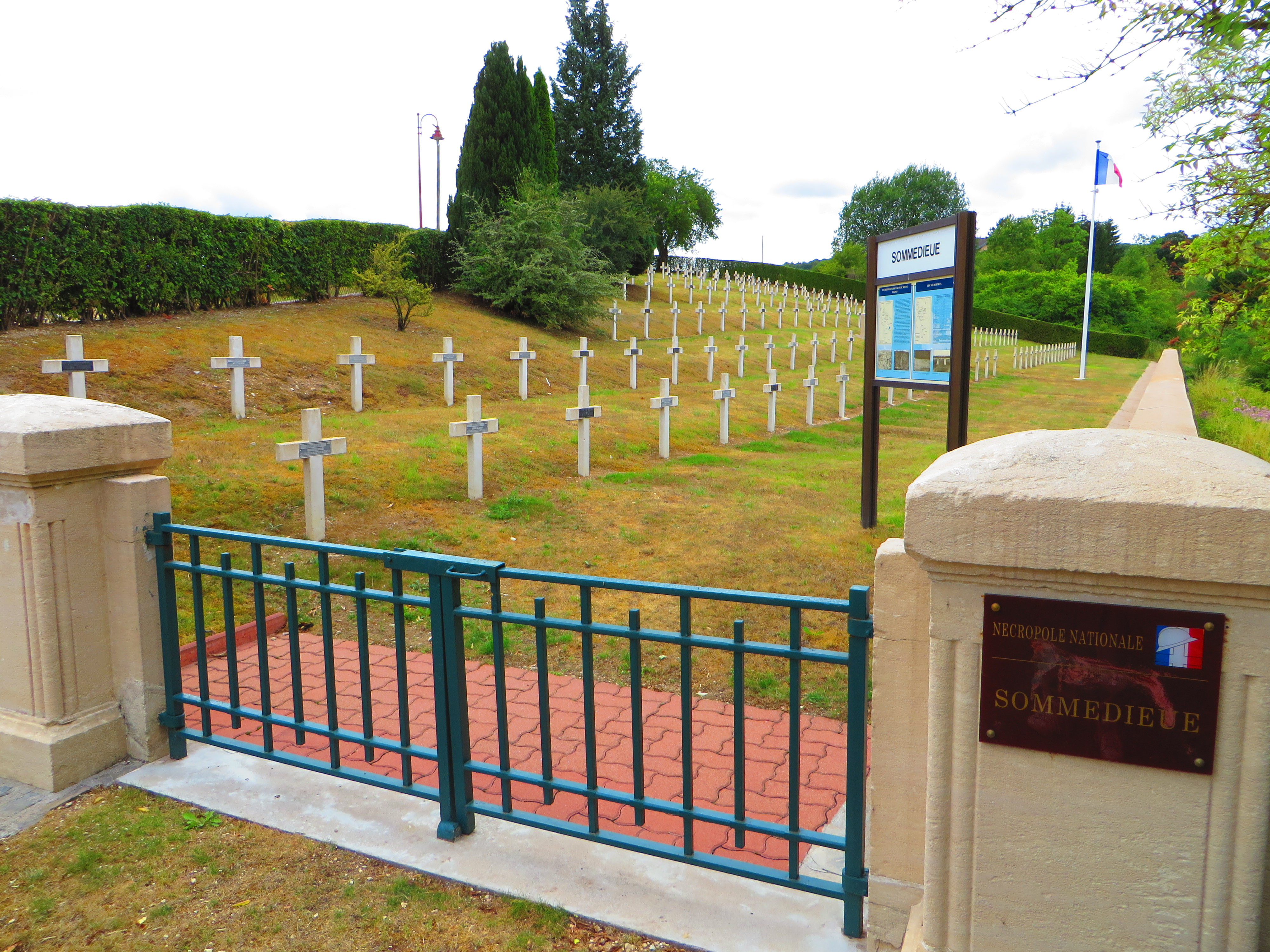 Sommedieue nécropole militaire française